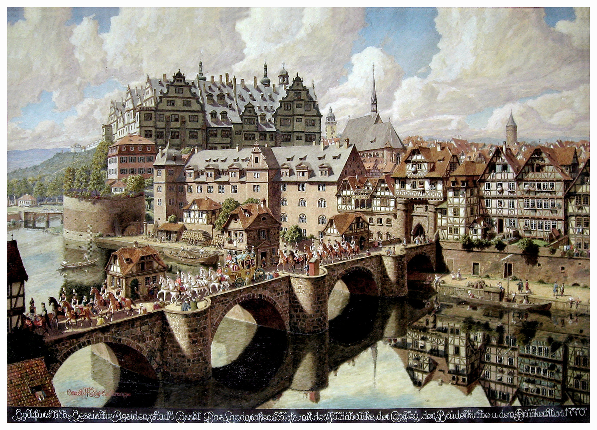 Gouache, 1956